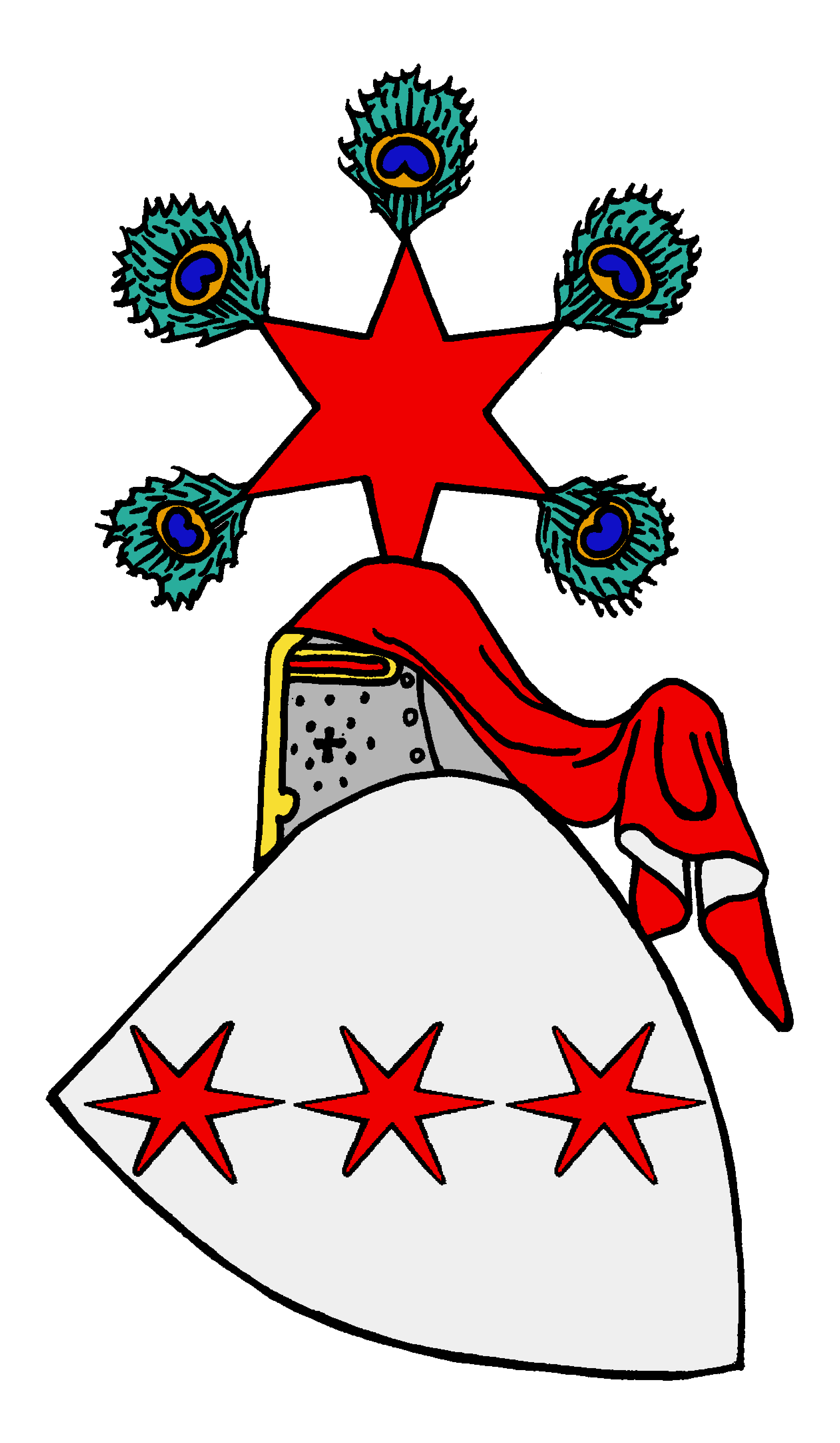 ursprüngliches Stammwappen der mecklenburgischen von Gamm